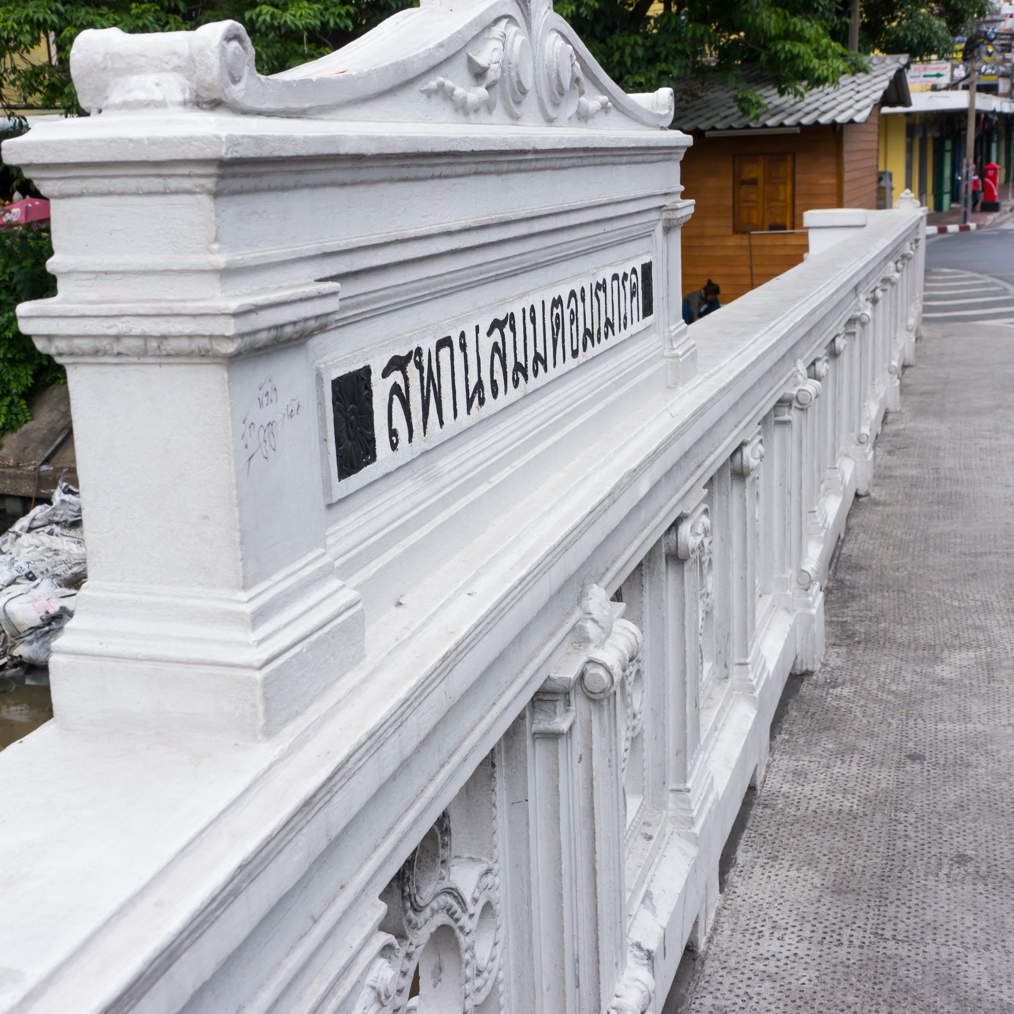 สะพานสมมตอมรมารค